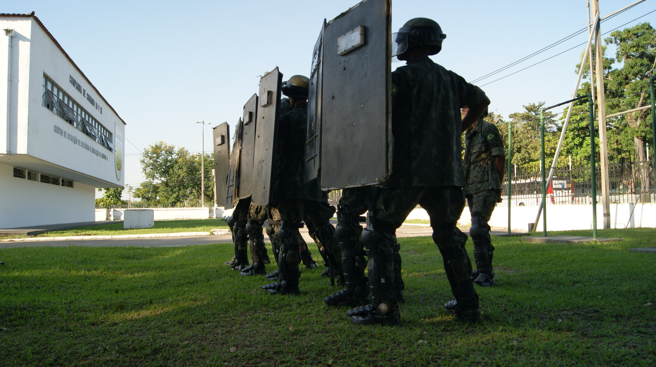 A Companhia de Comando da 1ª Divisão de Exército realizou, no período de 02 a 05 de junho, o exercício da Instrução Individual de Qualificação para Operações de Garantia da Lei e da Ordem (IIQ-GLO).